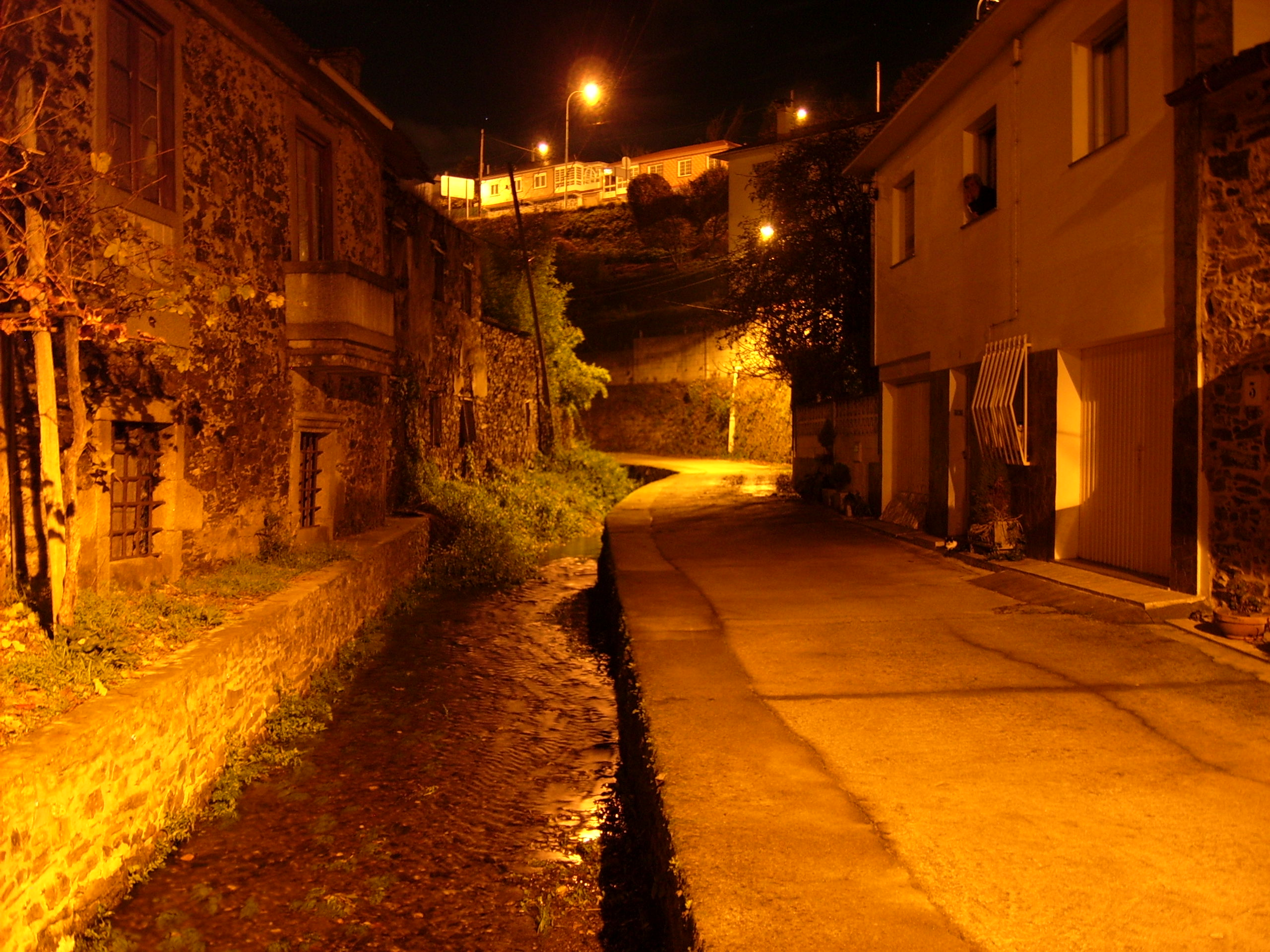 Río dos Pelamios, Caraña de Abaixo, Tiobre, Betanzos. Nocturna